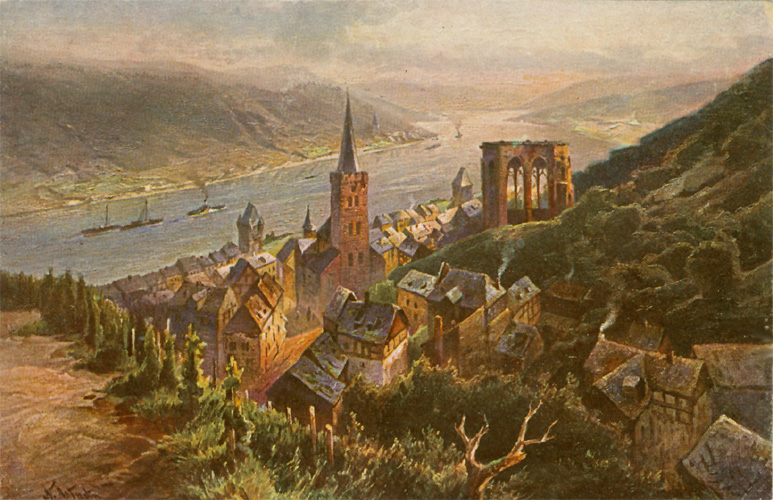 Aus der Serie „Astudin-Karten vom Rhein“